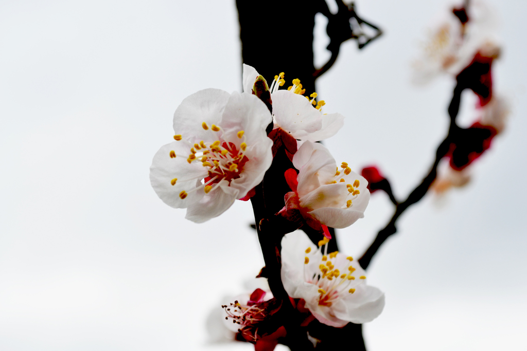 fiore di albicocco